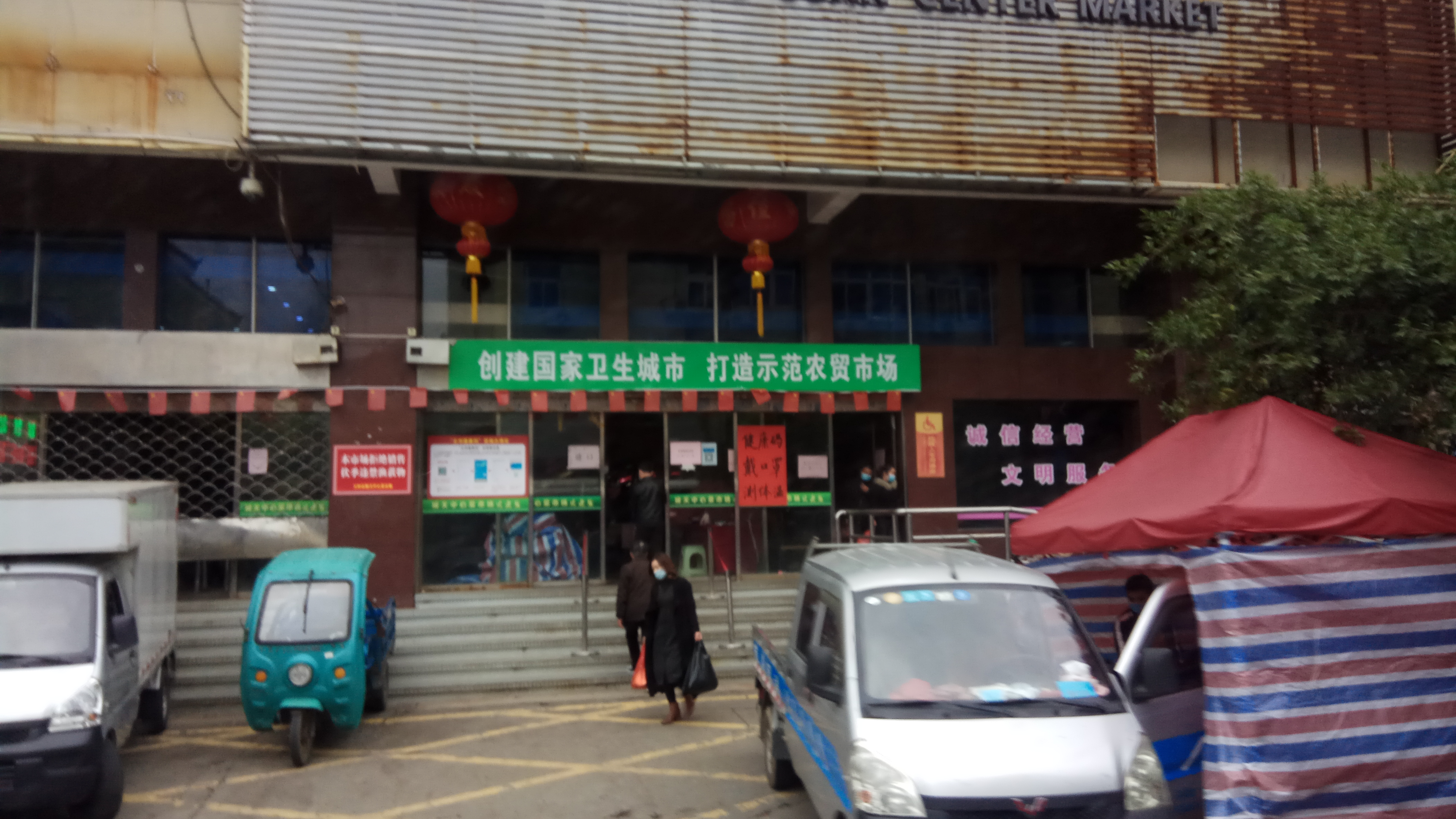 中文（中国大陆）: COVID-19疫情暴发期间，玉环城关中心菜市场门口的检测点